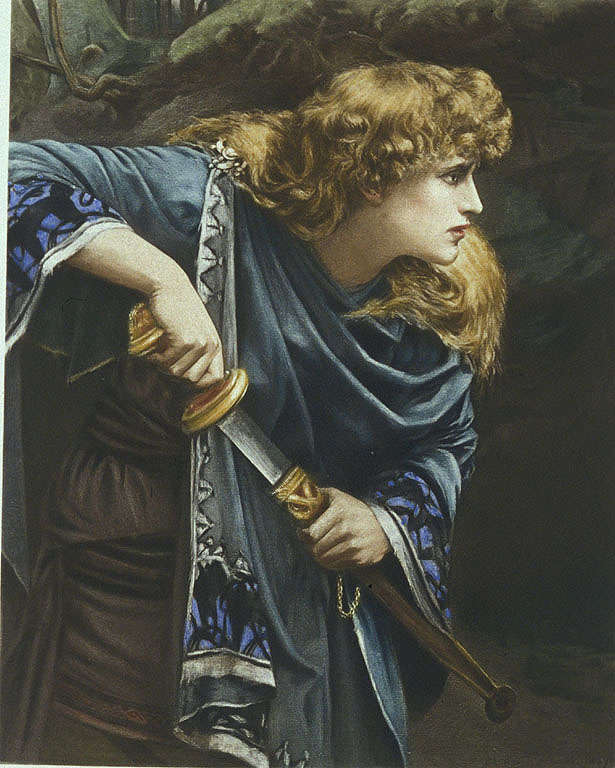 Imogen